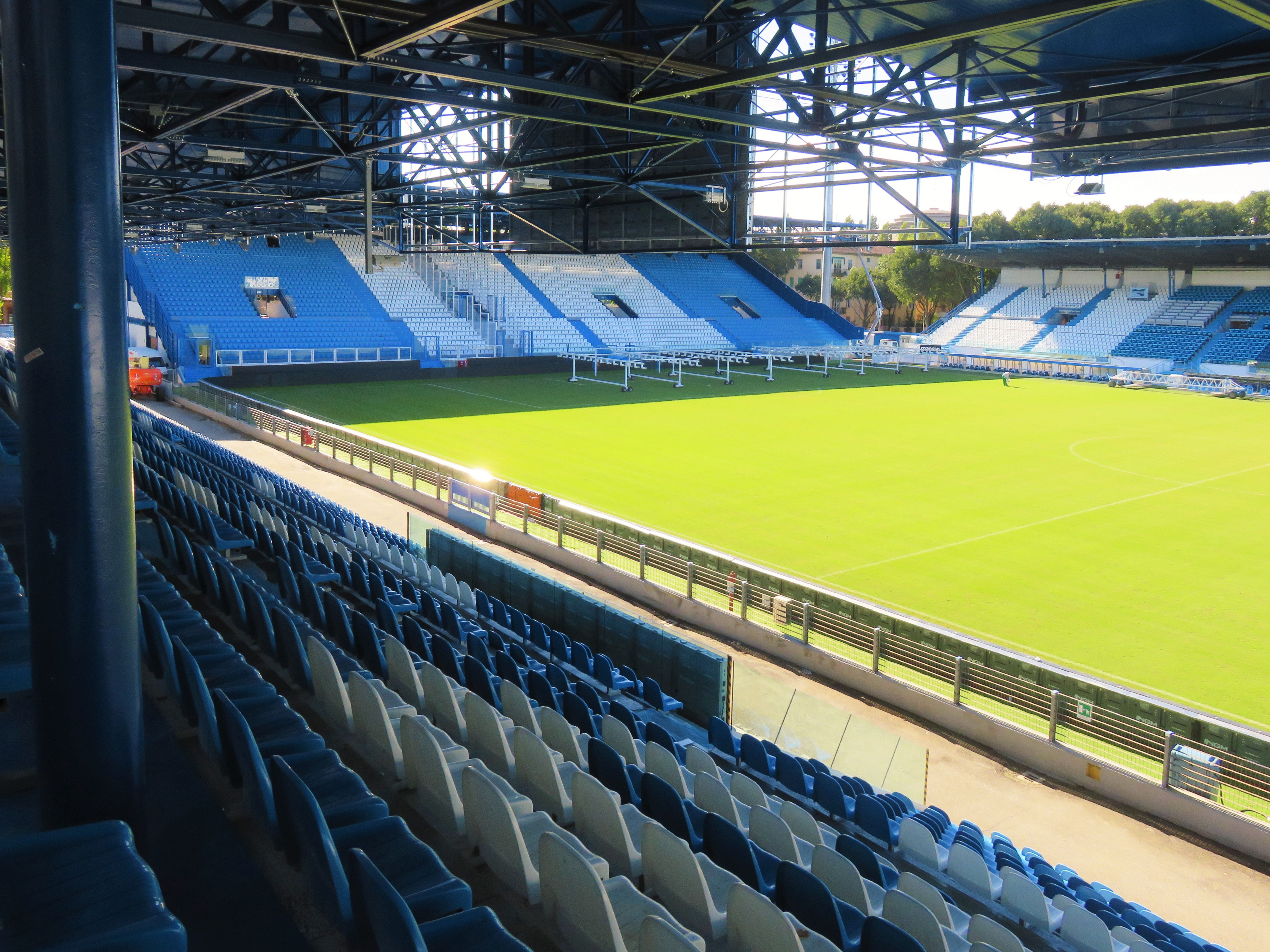 Stadio dopo i lavori di ampliamento, ottobre 2018